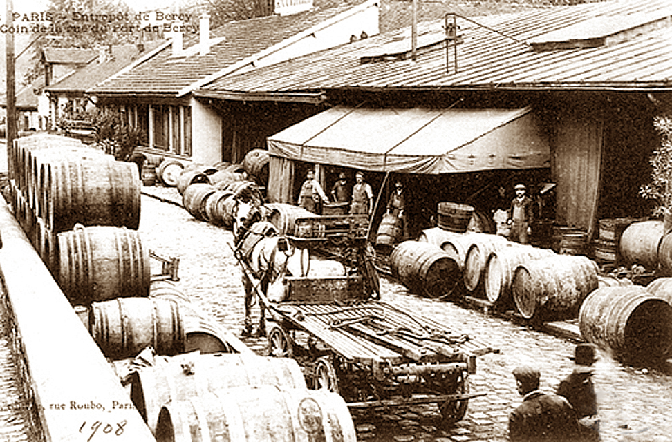 Les entrepôts de Bercy au coin de la rue du port de Bercy